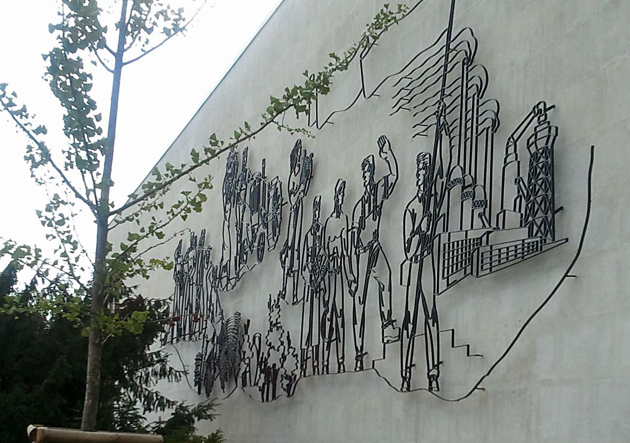 MOM Kulturális Központ. Takarásban Gáldi Gyula szocreál kompozíciója.